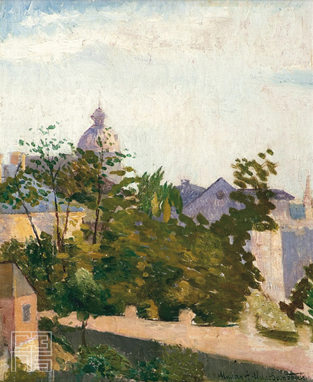 Фотографија слике, Милан Миловановић: Мотив из Београда 1909 година.